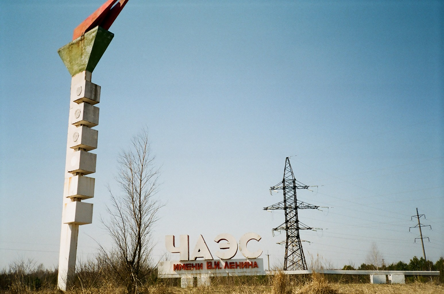 A csernobili atomerőműt jelképező fáklya a pripjatyi elágazás közelében, a Vörös-erdő mellett (Ukrajna)